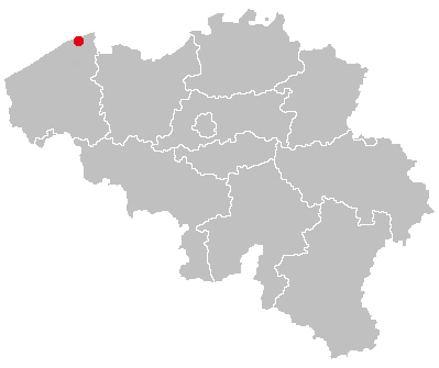 Zeebrugge in Belgium